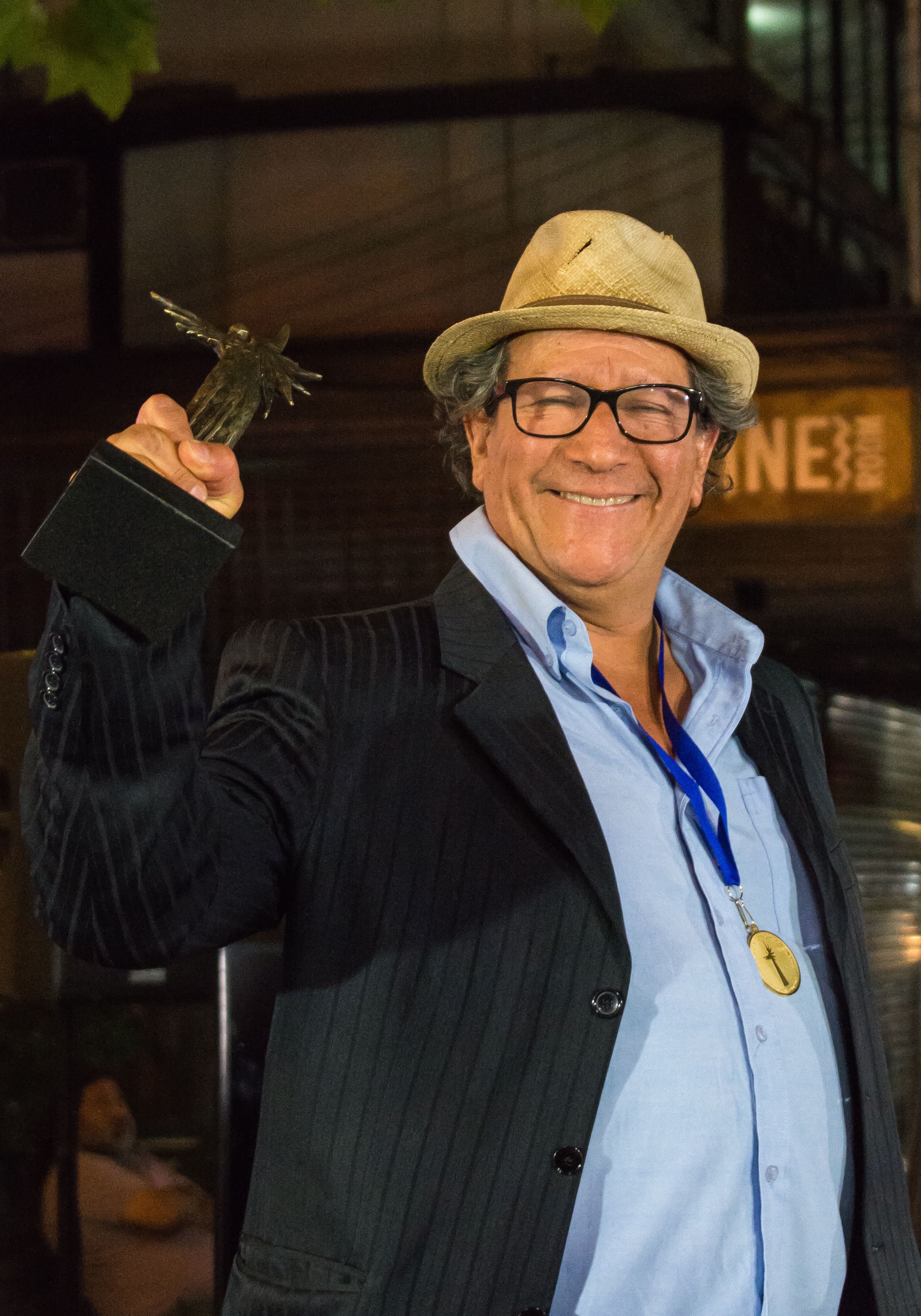 Alejandro Trejo, Premios Caleuche, Teatro Oriente, Providencia, Santiago, Región Metropolitana de Santiago, Chile.